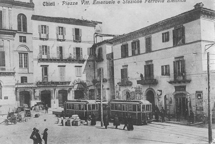 Vecchia foto della stazione della ferrovia adibita al collegamento della stazione di Chieti Scalo con il centro storico teatino.